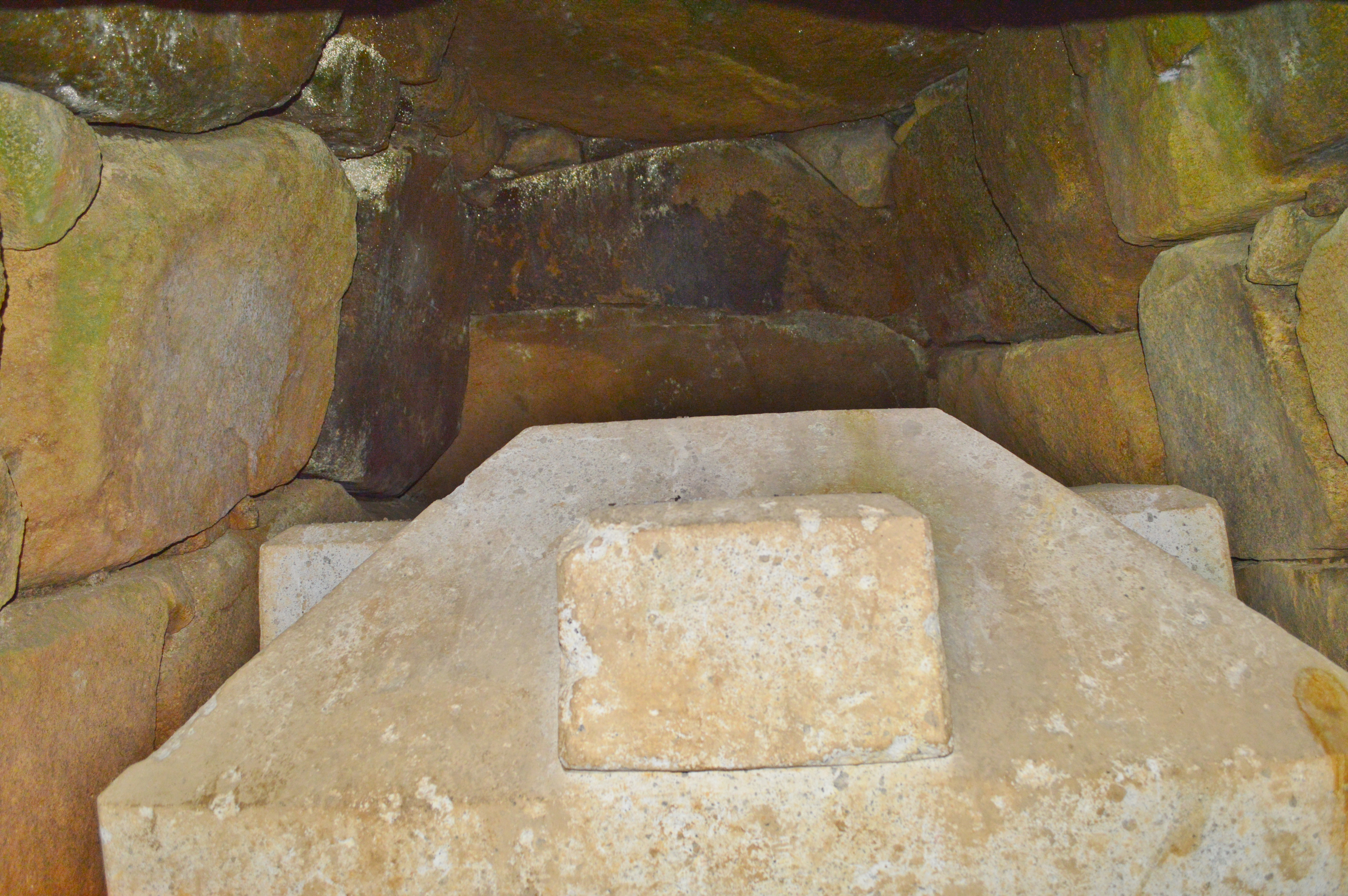 金山古墳 石室玄室